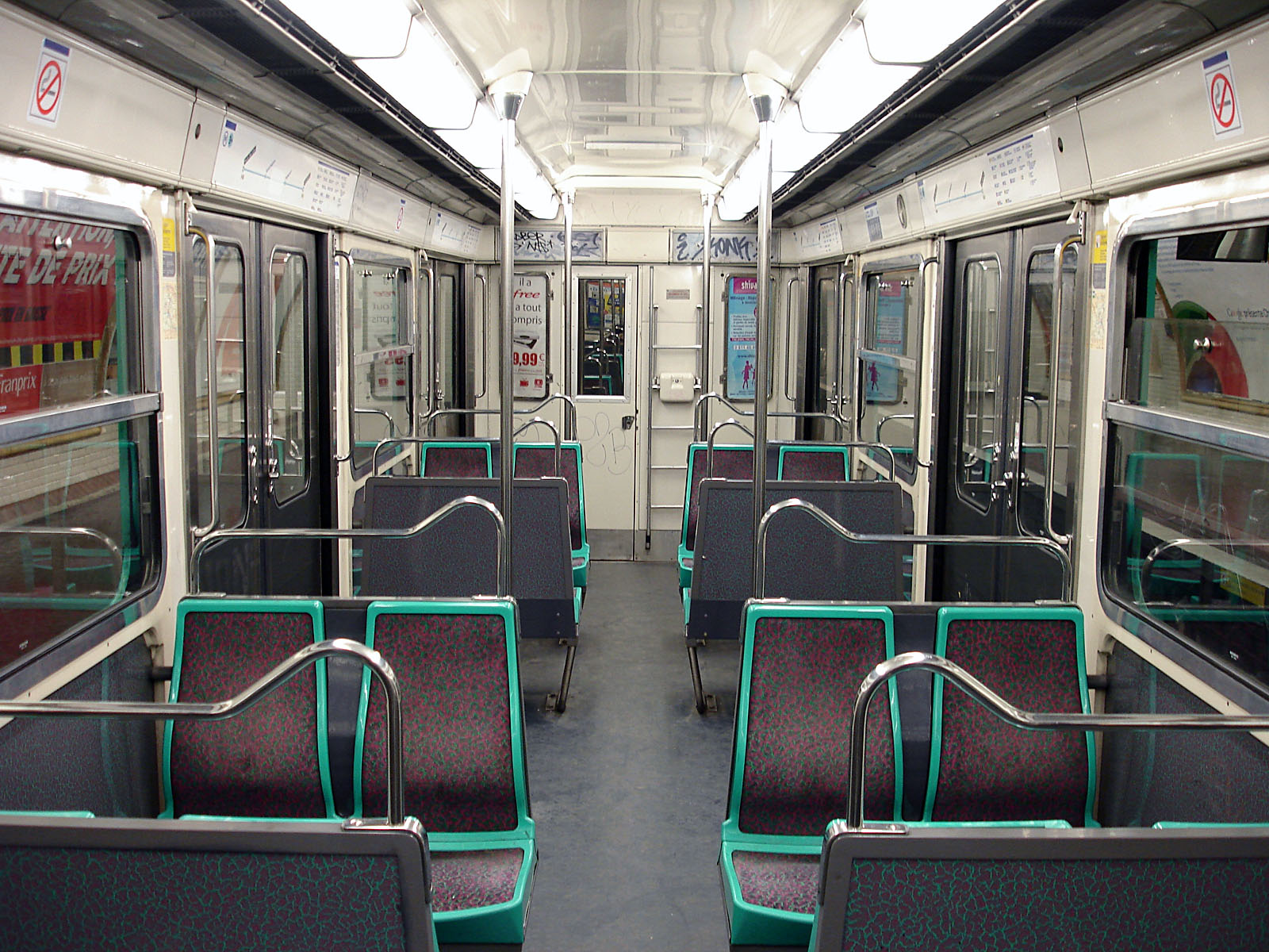 Intérieur d'un MF 67 de la ligne 3 bis du métro de Paris, France. Vu la faible fréquentation, les rames sont dépourvues de strapontins sur cette ligne.